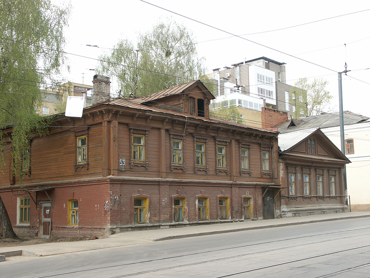 Россия: Нижний Новгород: Нижегородский район: ул.Большая Печёрская,53,51; 10:11 08.05.2006